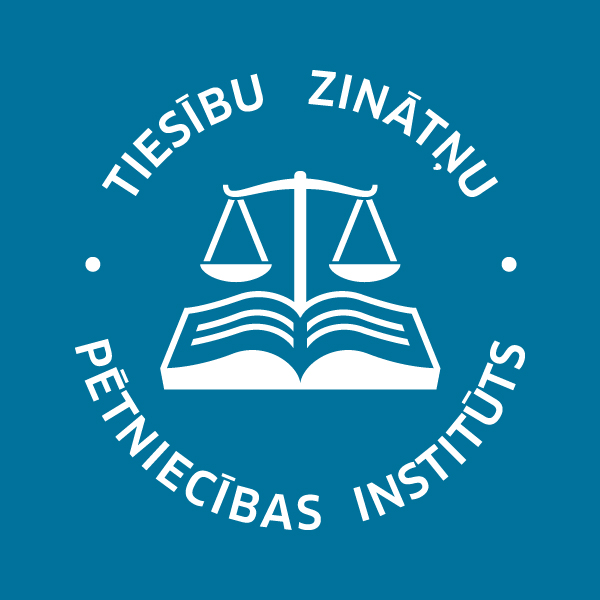 Tiesību zinātņu pētniecības institūts